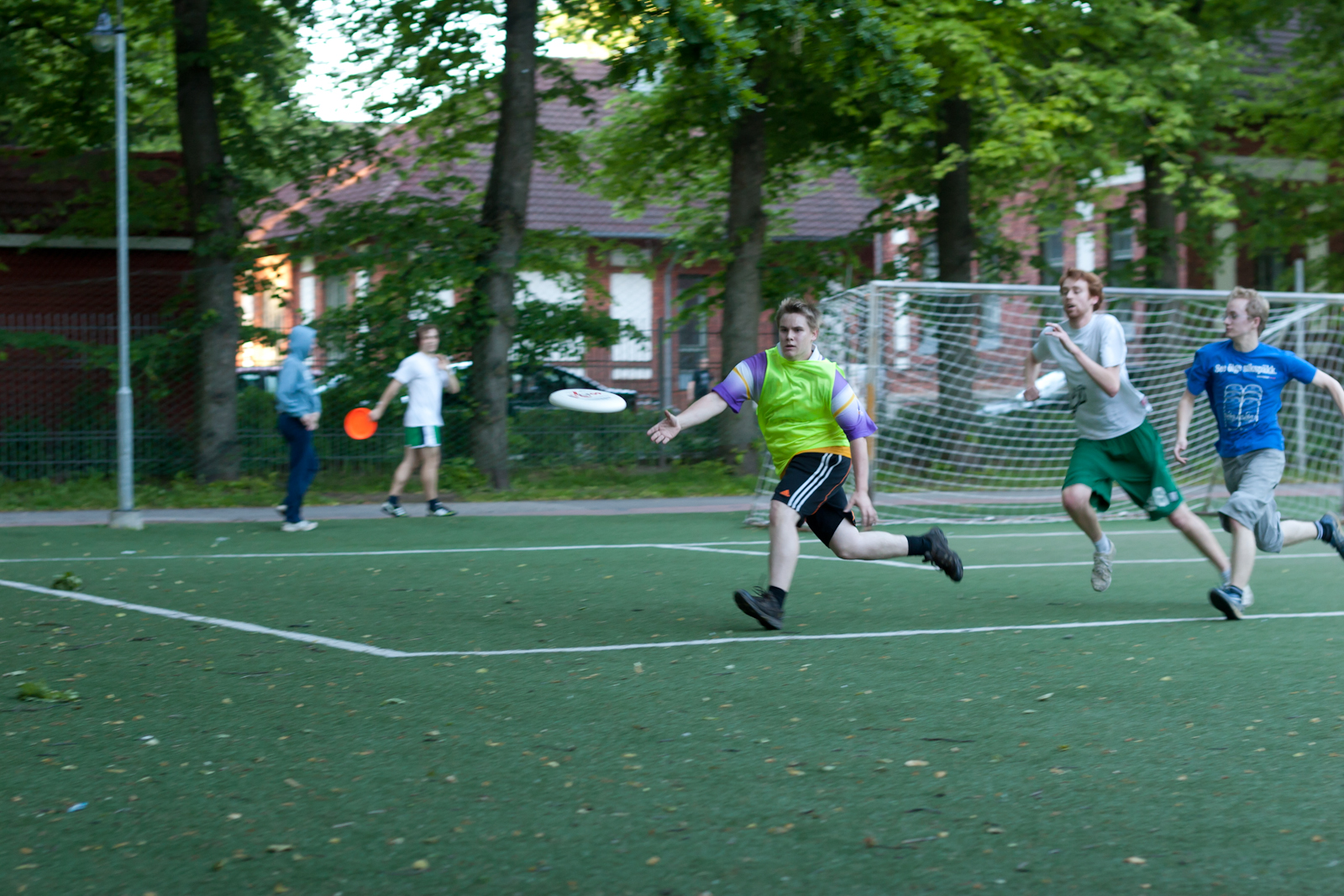 Tartu frisbeeklubi. Miina Härma Gümnaasiumi muruväljak.